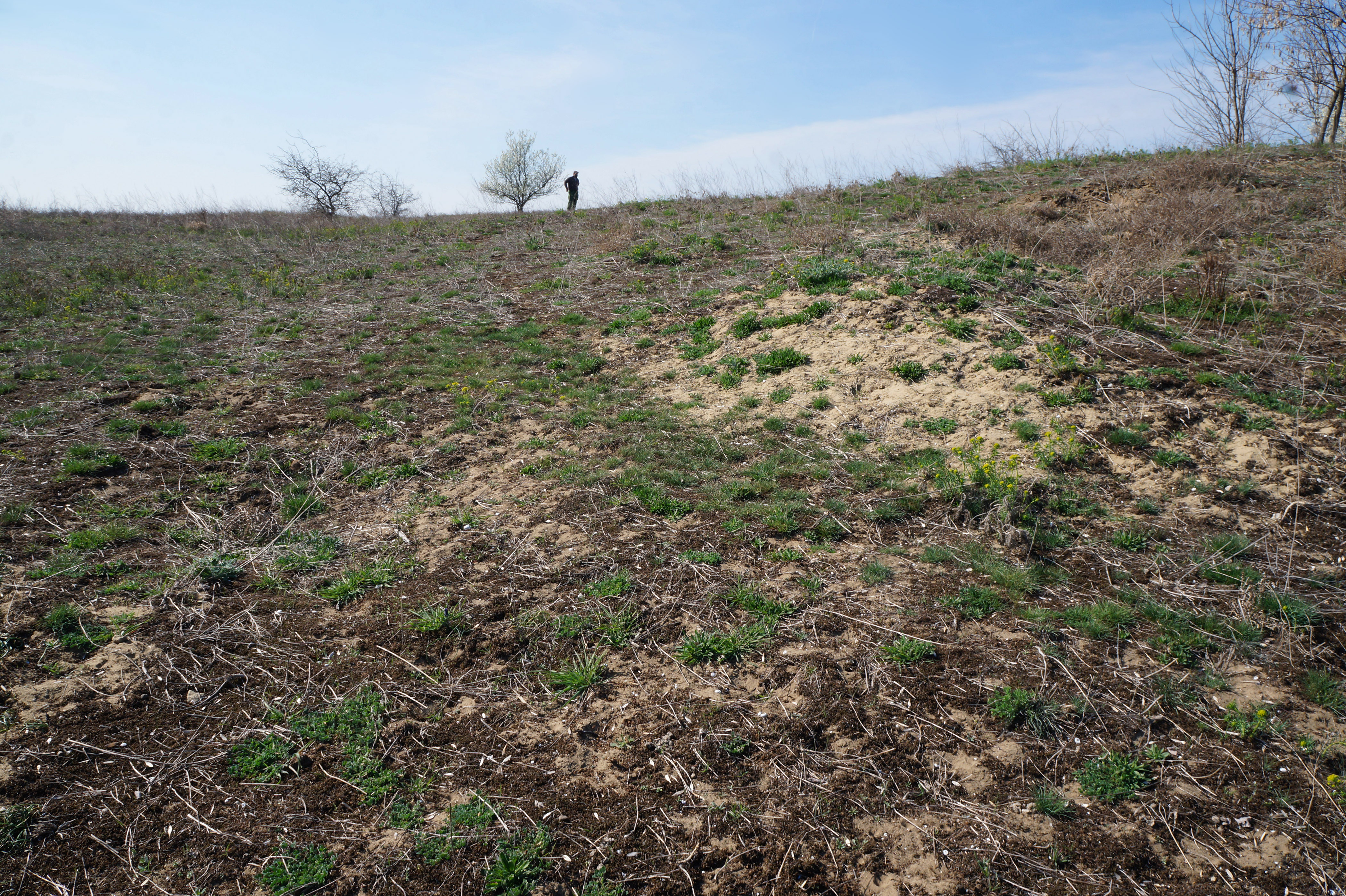 Peščane dine kod Bačkog Brega u Vojvodini.